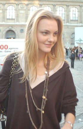 Model Caroline Trentini depicted person: Caroline Trentini (age: 19.2)